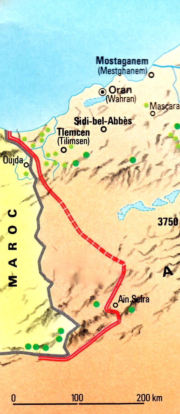 Barrage Ouest sur la frontière algéro-marocaine durant la guerre d'Algérie